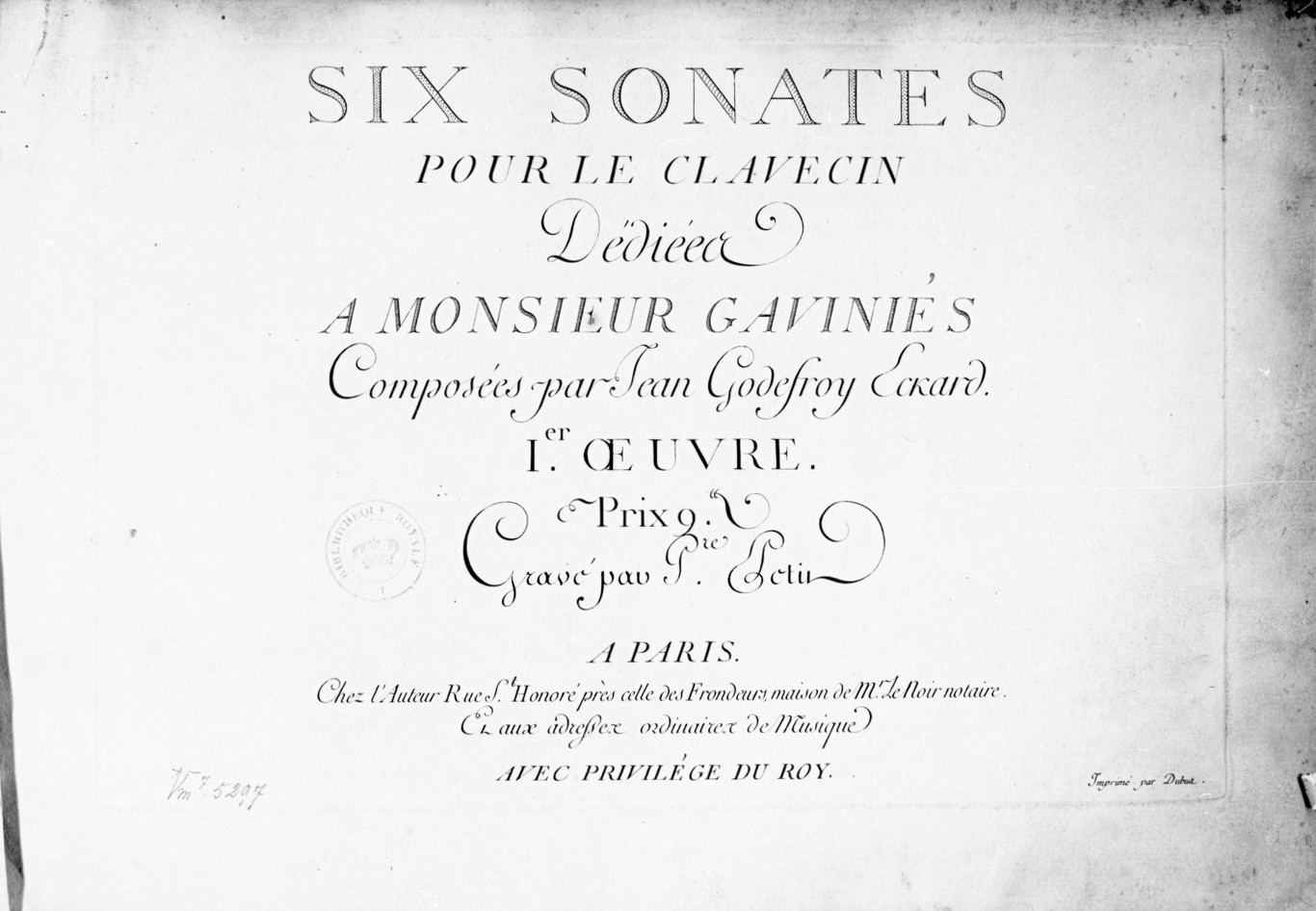 Johann Gottfried Eckard, page de titre des sonates opus 1, publiées en 1764.